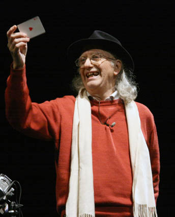 Spanische Zauberkünstler Juan Tamariz